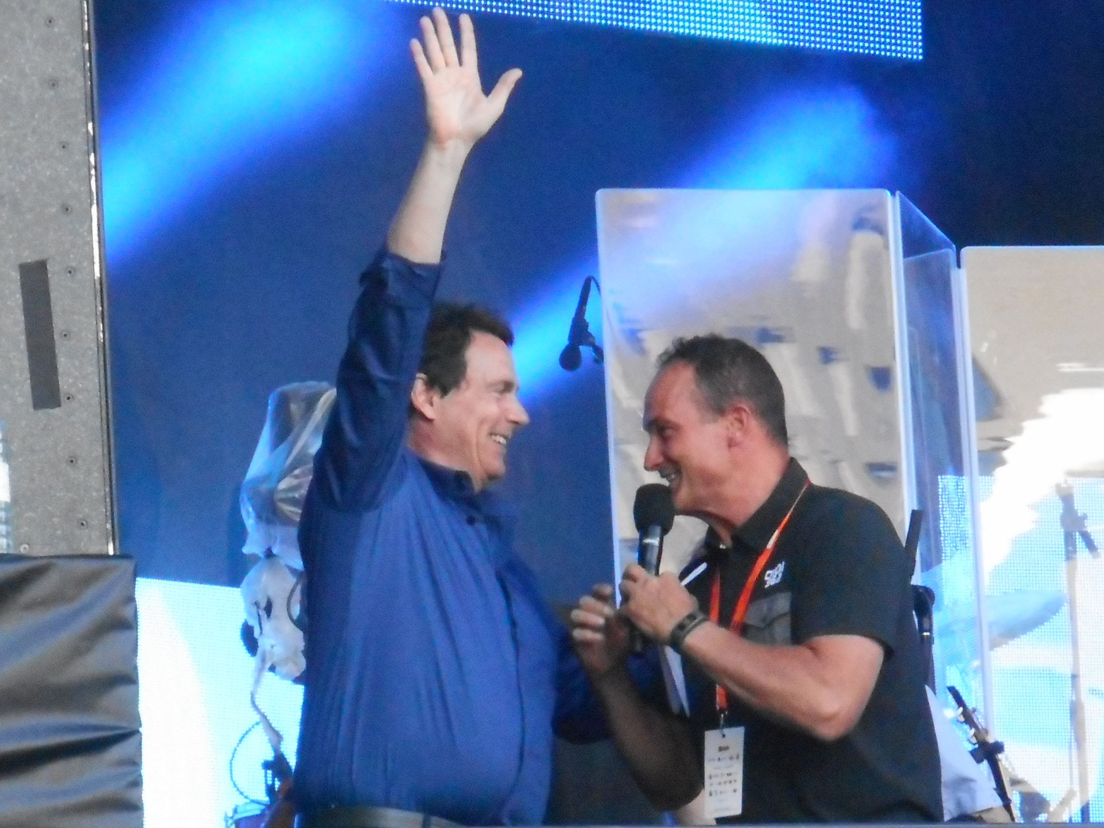 Fête nationale du Québec à Montréal, place des Festivals